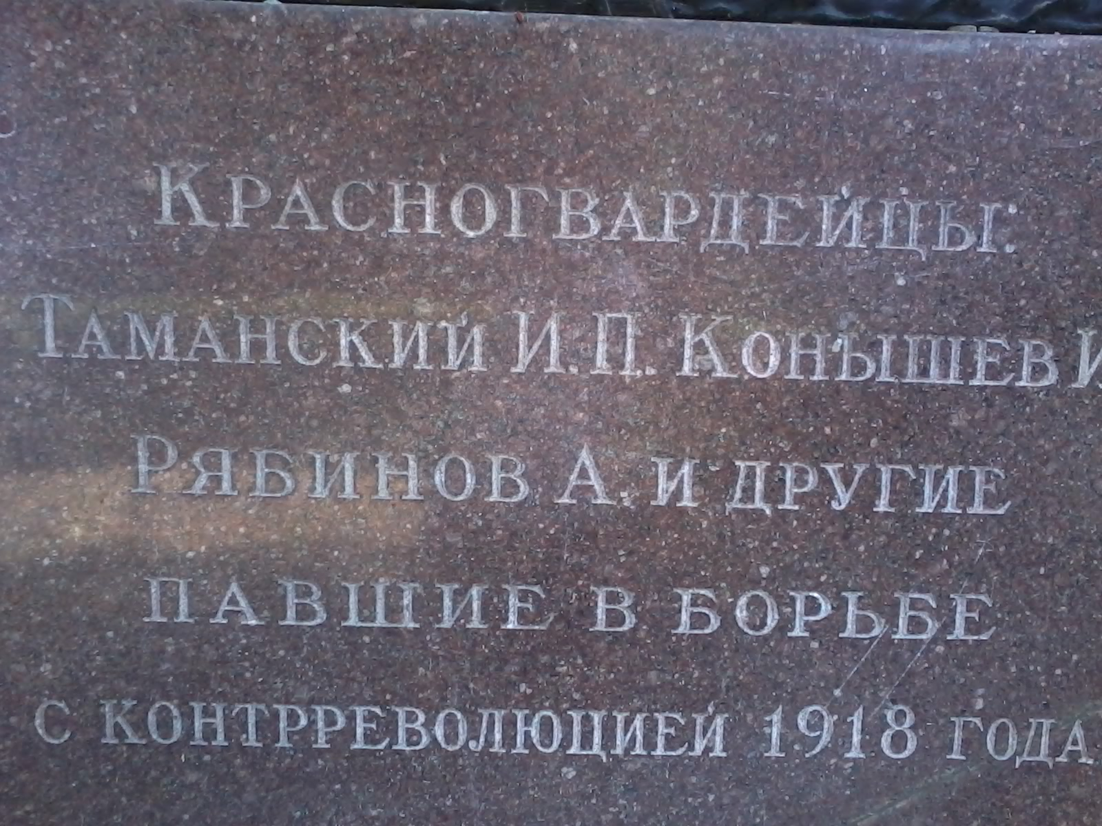 Стела героям гражданской войны 1918 года в Рязанской области